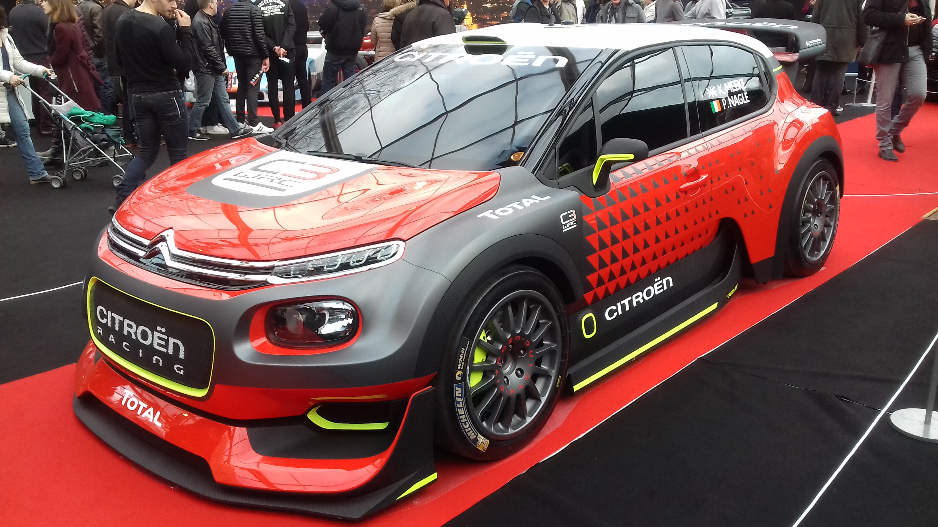 Citroën C3 WRC au Festival automobile international 2017